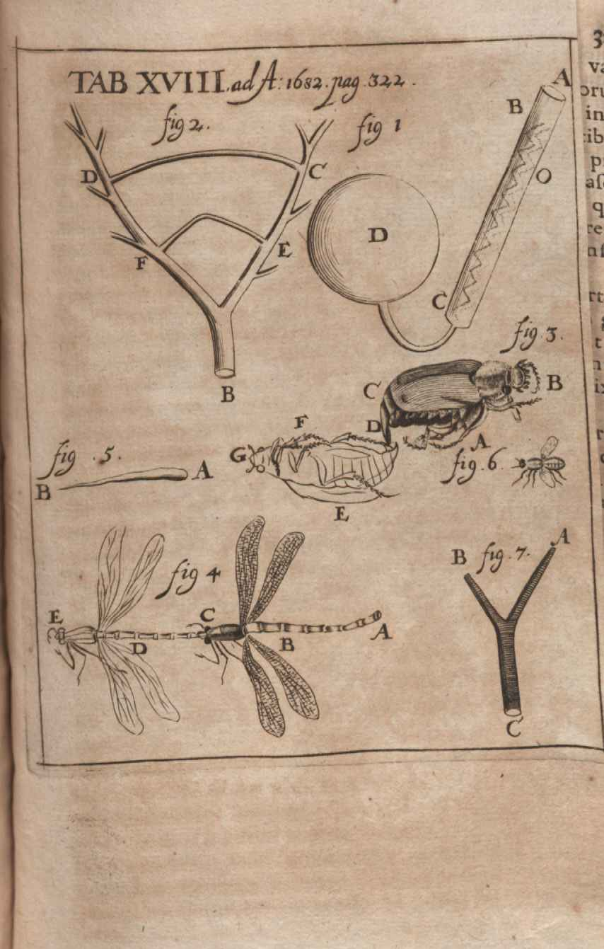 Illustration